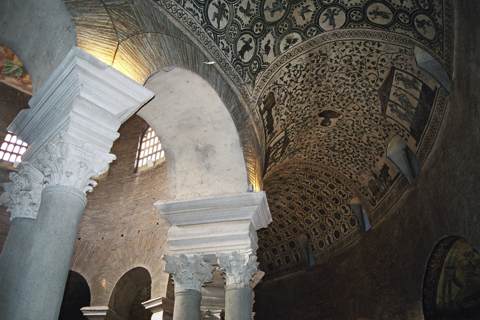 descripció Mausoleu de Santa Costanza. Inteior. Volta anular del deambulatori